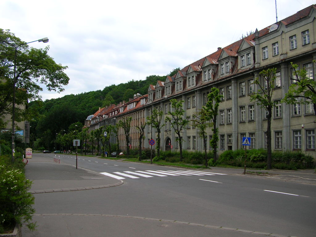 Wałbrzych - Aleja Wyzwolenia.